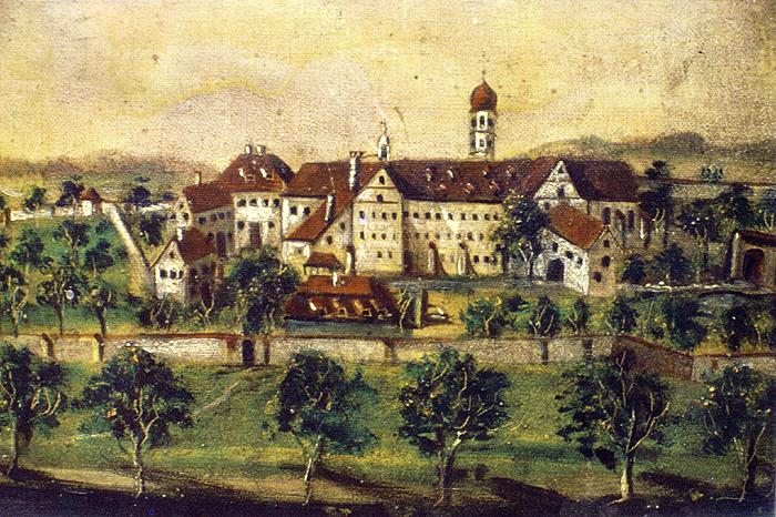 Die Zisterzienserinnenabtei Heggbach. Ölgemälde, 18. Jh.